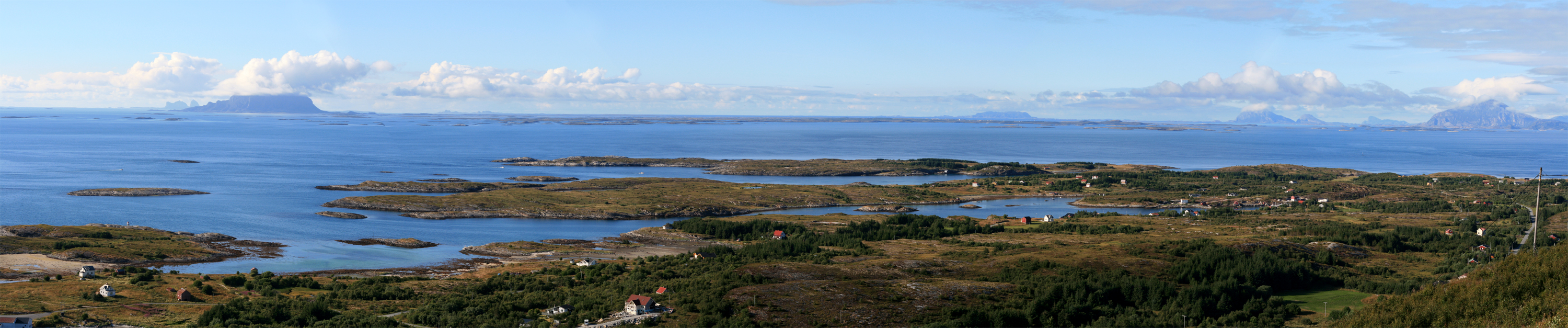 Utsikt over strandflata på Helgelandskysten fra Dønnesfjellet i Dønna. Her ses flere av restfjella som er landemerker på Helgelandskysten: Fra venstre: Træna, Lovunda, Selvær, Nesøya, Hestmona, Rødøyløva og Lurøyfjellet.